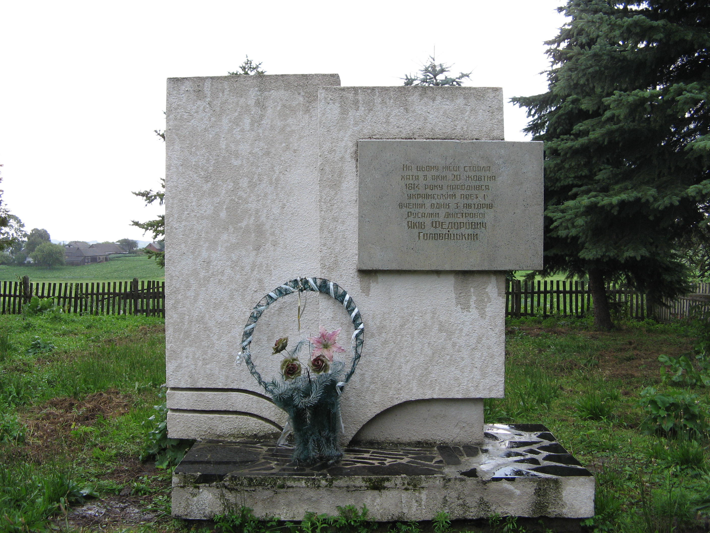 Пам'ятний знак на місці, де стояла хата, в якій народився один з авторів “Русалки Дністрової”, український поет і вчений Я. Ф. Головацький (пам., арх. Я. Руцький), Чепелі